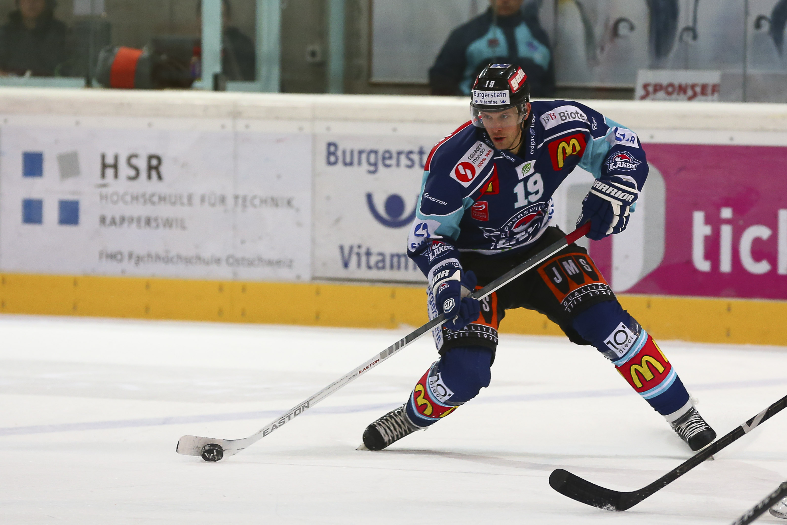 Rapperswil-Jona Lakers